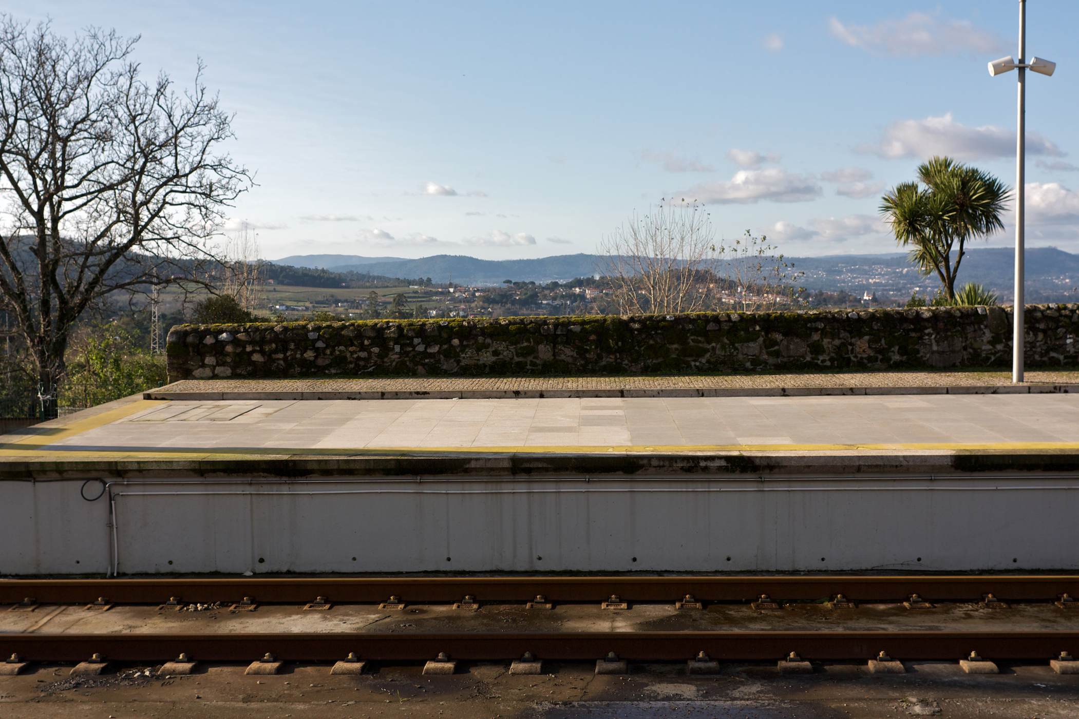 Tipo: ES Estação Satélite Local: Braga Ramal de Braga, PK 53 Data e hora: 17 de Dezembro de 2009 14h56